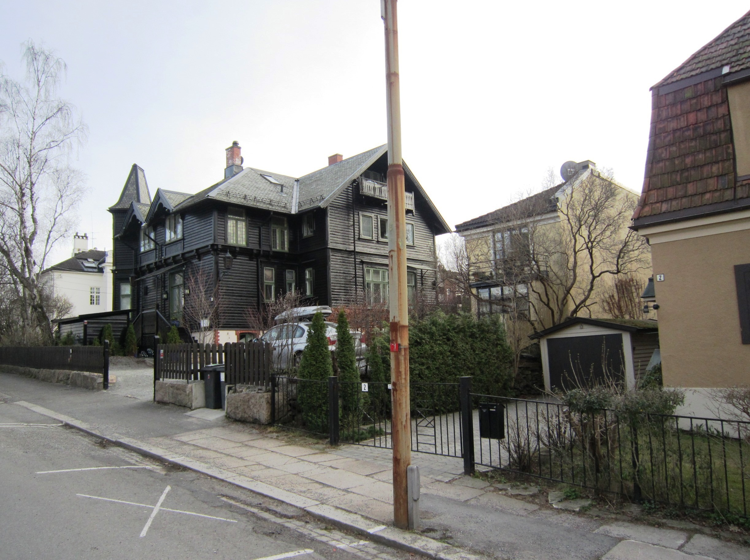 Sigyns gate i Oslo